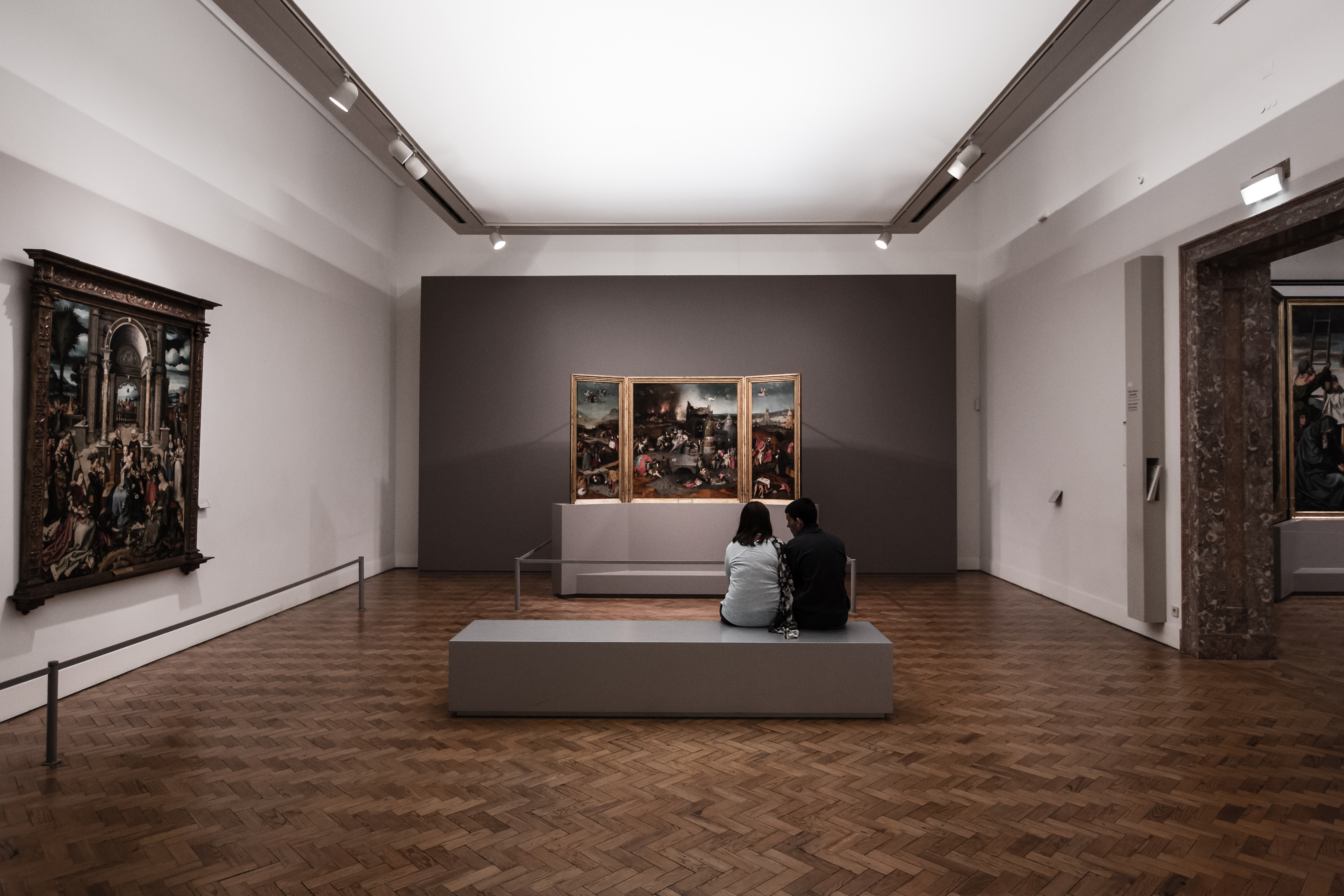 A Tentação de Santo Antão Hieronymus Bosch | Museu Nacional de Arte Antiga, Lisboa